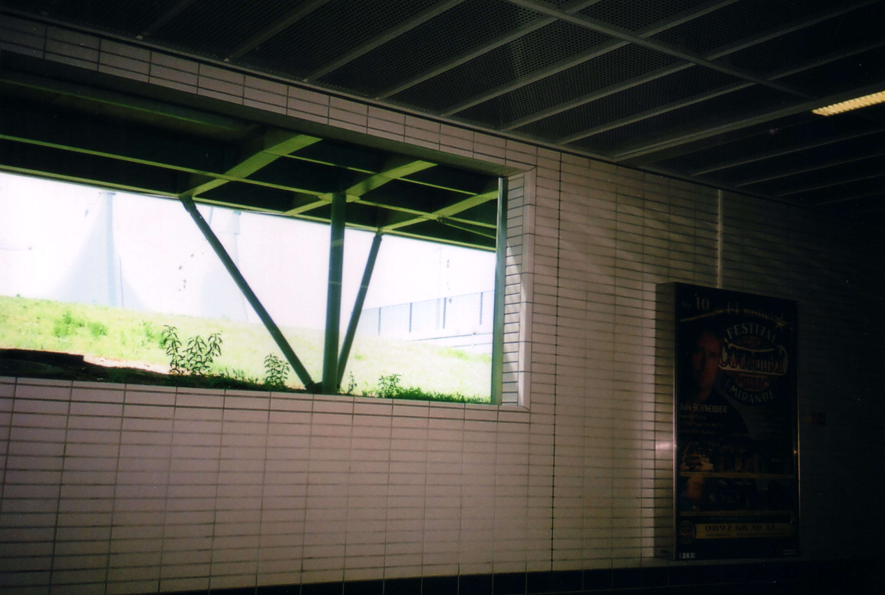 Sur le quai - direction Balma-Gramont - de l’arrêt de métro Argoulet, Toulouse, France